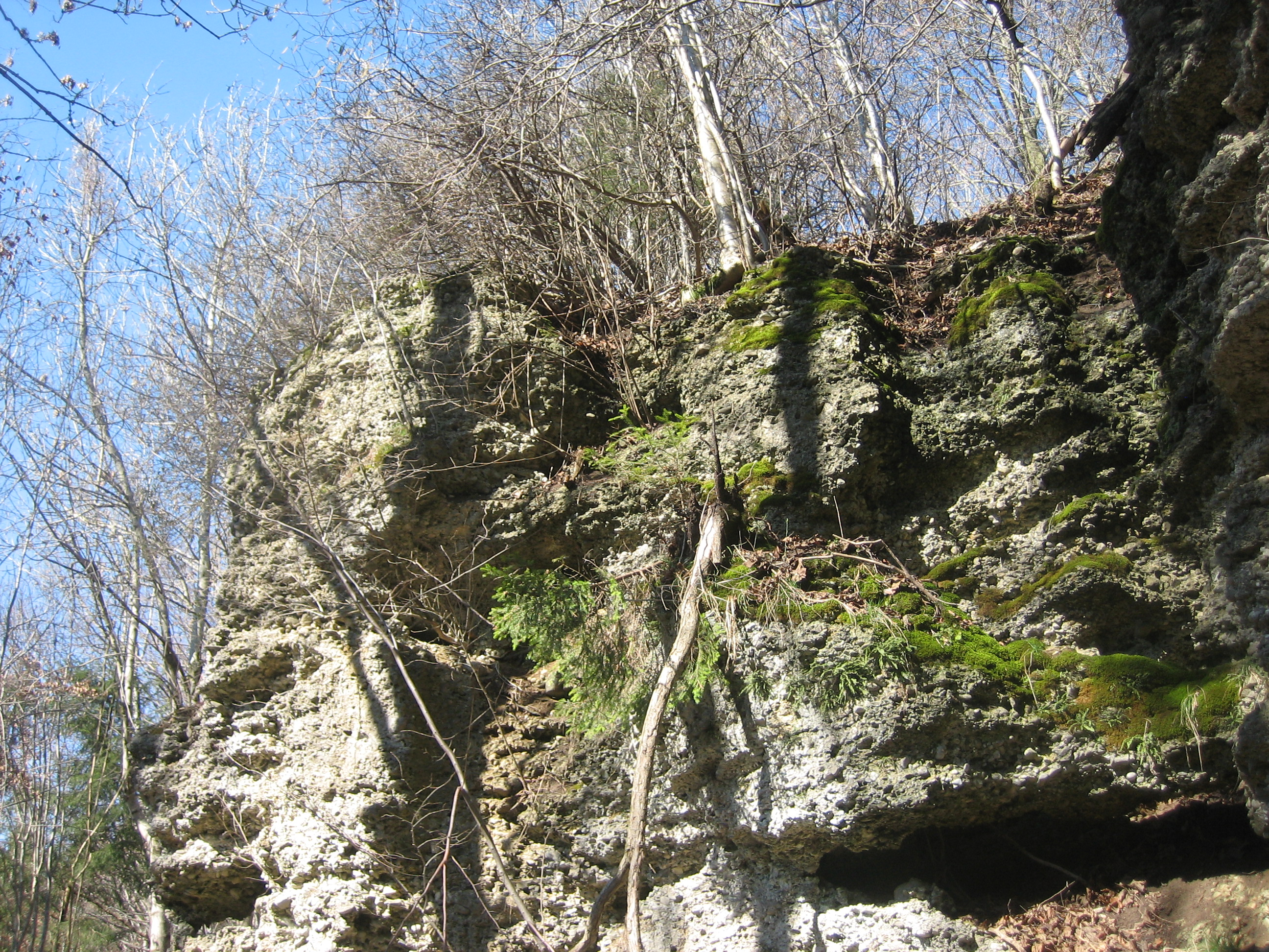 Geologische Orgeln, zwischen Ottobeuren und Wolfertschwenden, nordöstlich von Niederdorf, im Landkreis Unterallgäu, Bayern